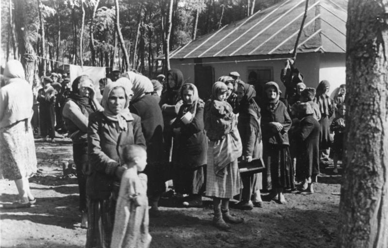 Rumänien, Juden im KZ An der Sowjetfront: (Rumänien) So sieht es in einem der jüdischen Konzentrationslager Bessarabiens aus. PK-Aufnahme: Kriegsberichter: Baas Sept. 41 8686-41